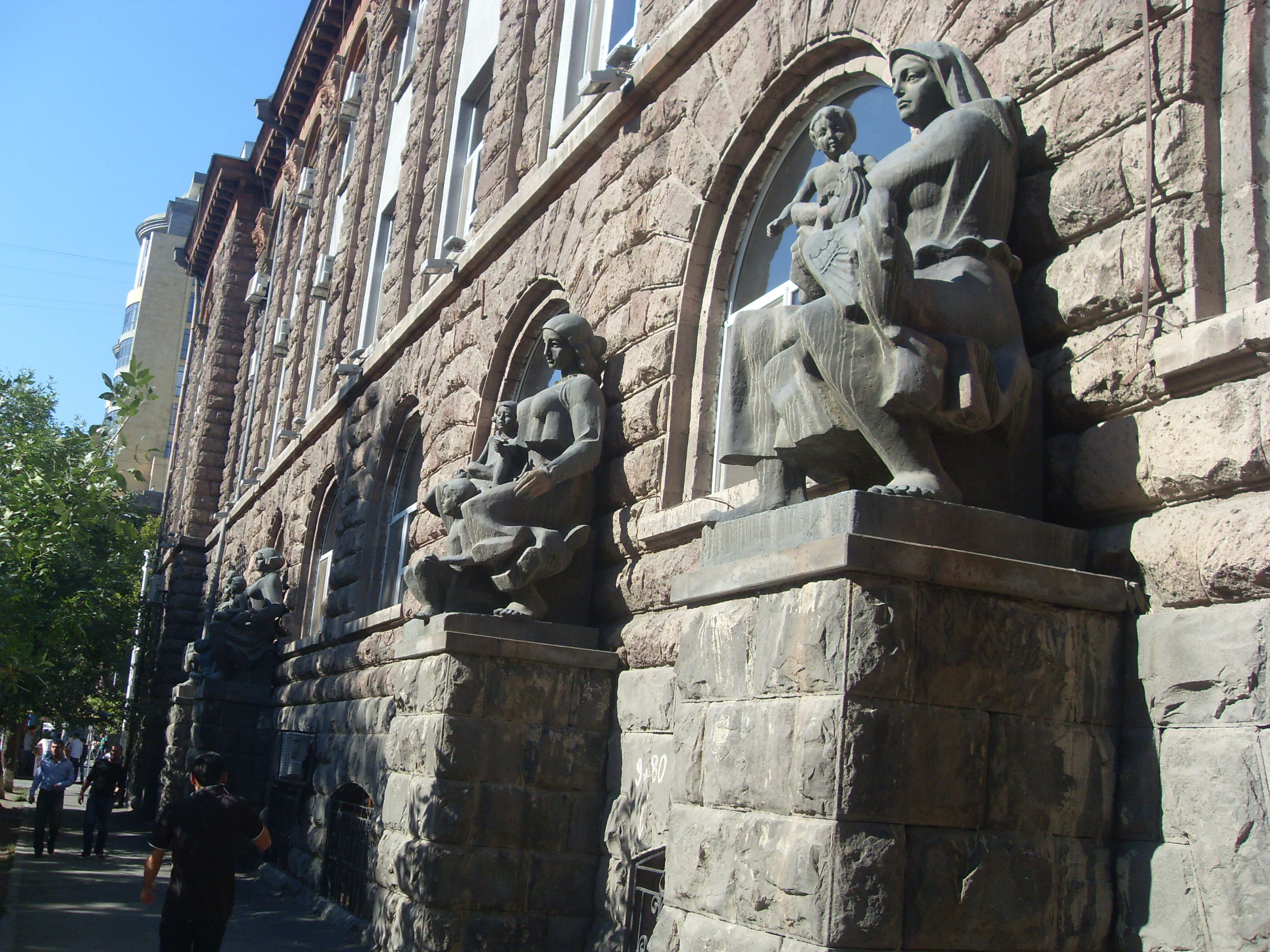 Ծննդատան շենք. Պարգև Մարգարյանի անվան Մոր և մանկան առողջության պահպանման հայկական գիտահետազոտական կենտրոն, 1931 թ.. 1936-1939 թթ., Երևան, ճարտ.` Մ. Գրիգորյան, Ն. Բունիաթյան 6/82